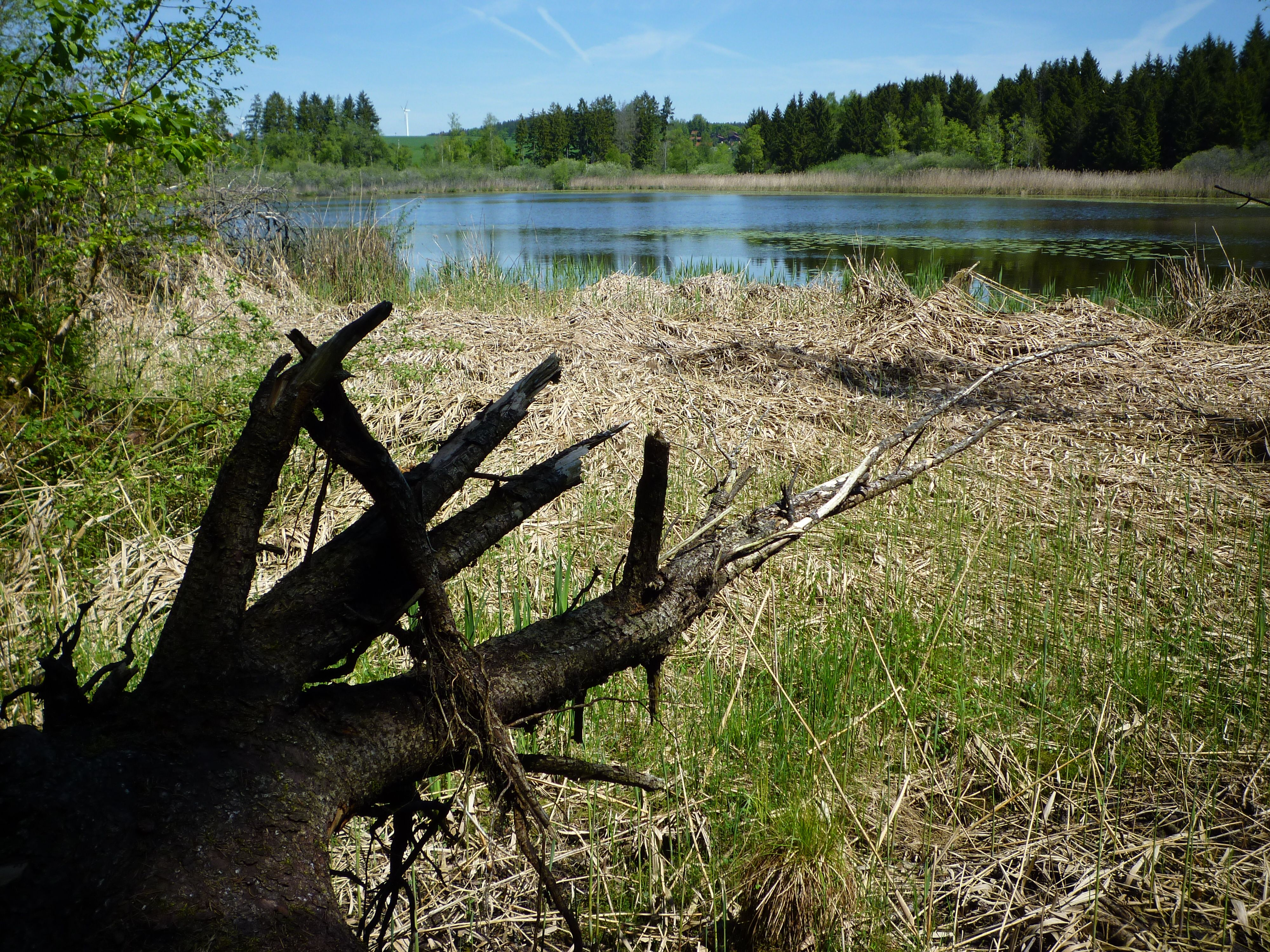 Volzweiher in Illmensee mit Schilfufer